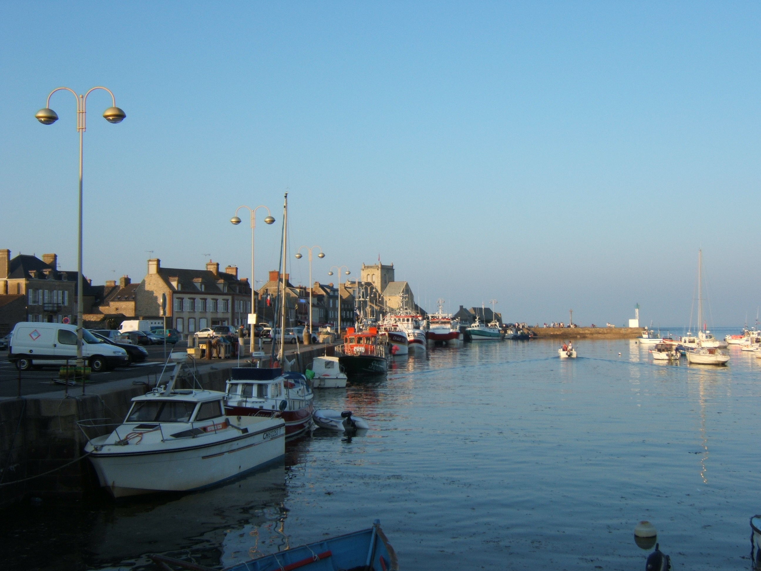 Le port de Barfleur dans le Cotentin, un soir d'été.